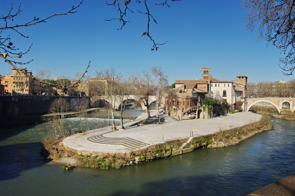 Rom, Tiberinsel